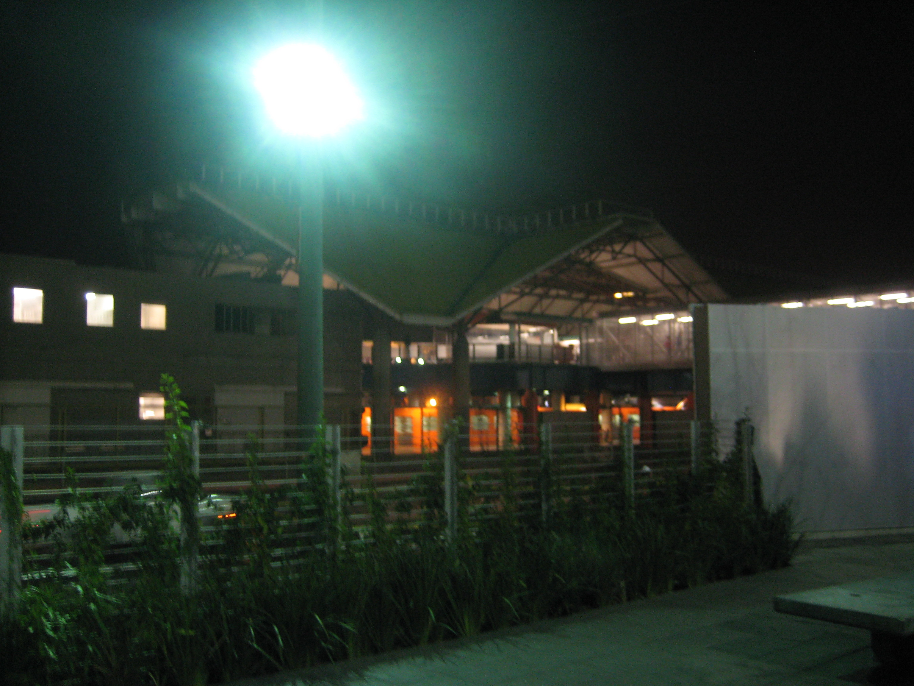 Terminal Ciudad Azteca de la Línea B del Metro